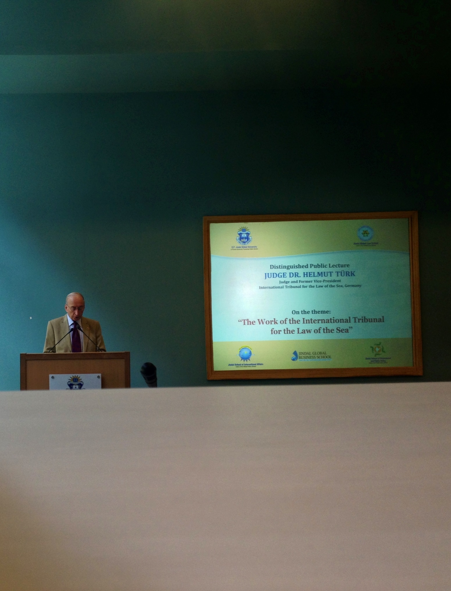 Judge Dr. Helmut Türk